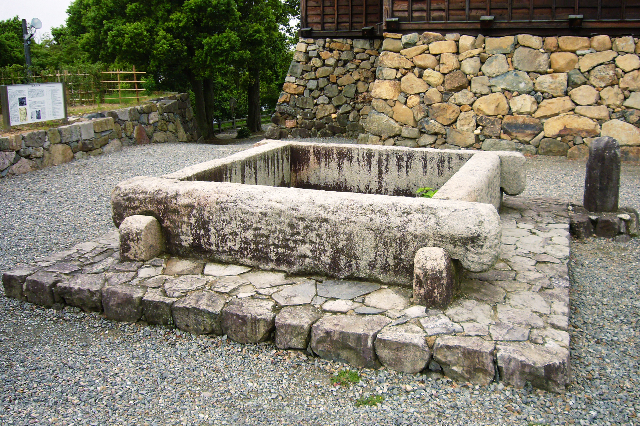 Fukuchiyama Castle in Fukuchiyama, Kyoto, Japan